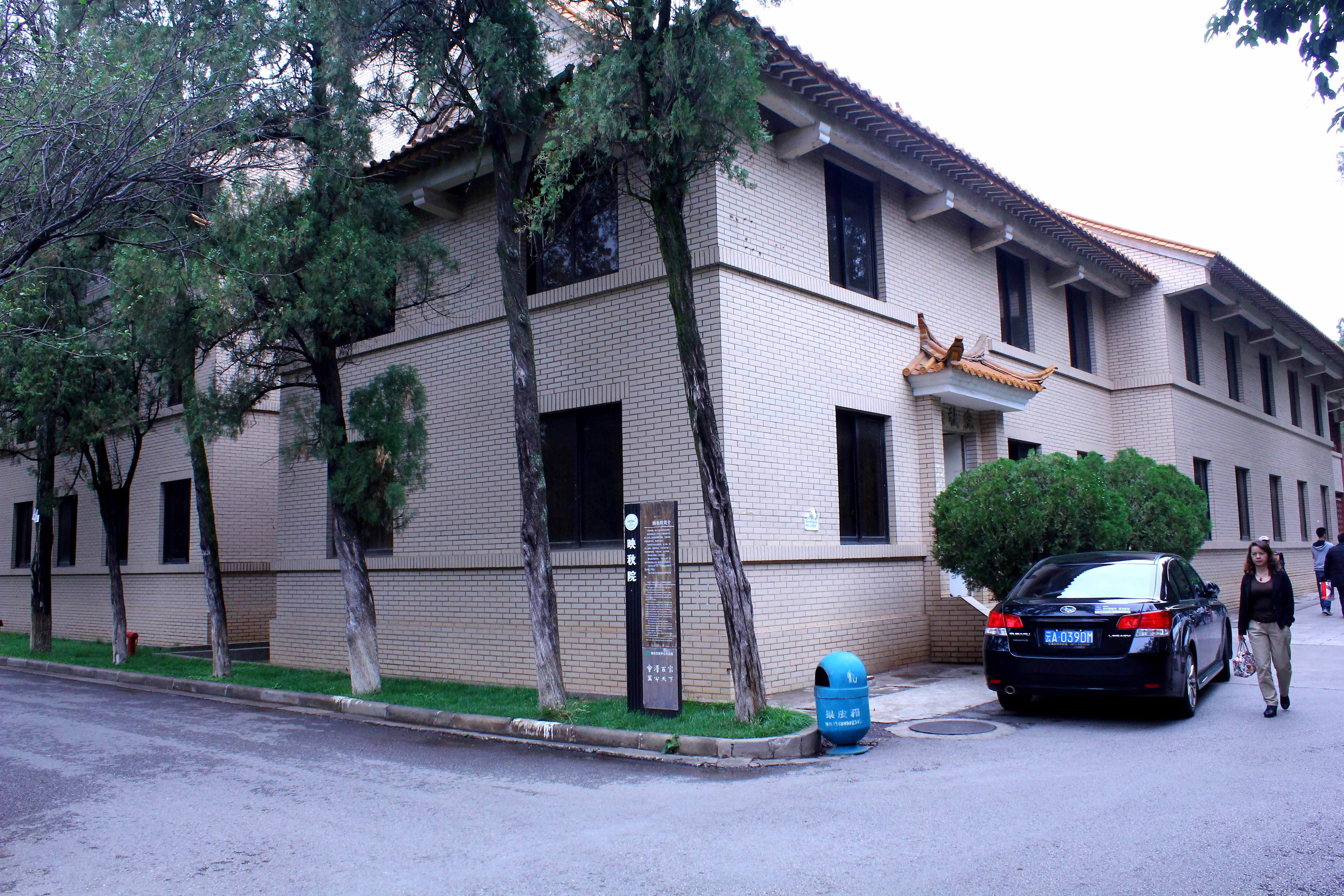 云南大学映秋院。